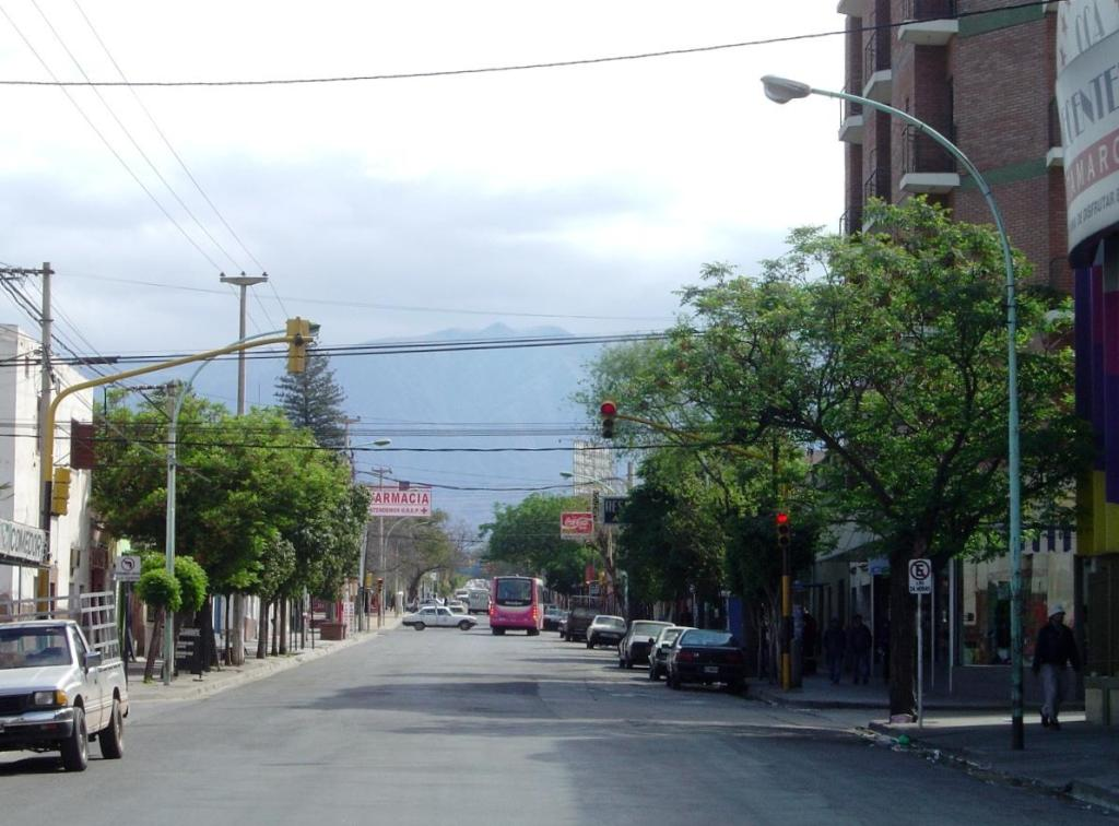 Avenida Guemes, San Fernando del Valle de Catamarca.